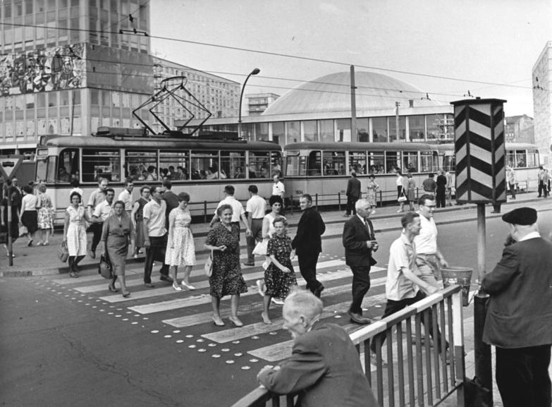 Zentralbild-Spremberg-Ga-Zi-23. 6. 1964 Zur neuen Straßenverkehrsordnung. Am Berliner Alexanderplatz (im Hintergrund das Haus des Lehrers mit Kongreßhalle) wurde jetzt ein Fußgängerschutzweg angelegt. Das ist eine der Veränderungen, die sich aus der neuen Straßenverkehrsordnung ergibt, die am 1. Juli 1964 in Kraft tritt. Der Fußgängerschutzweg wird durch eine Ampel und den Zebrastreifen gekennzeichnet. Fußgänger haben hier den Vorrang.